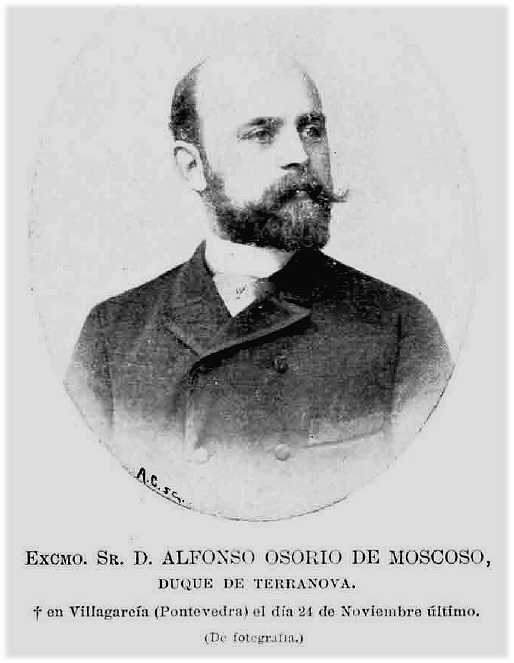 Alfonso Osorio de Moscoso y Osorio de Moscoso, (1858 -1901), II duque de Terranova, marqués de Monasterio, avogado e político español